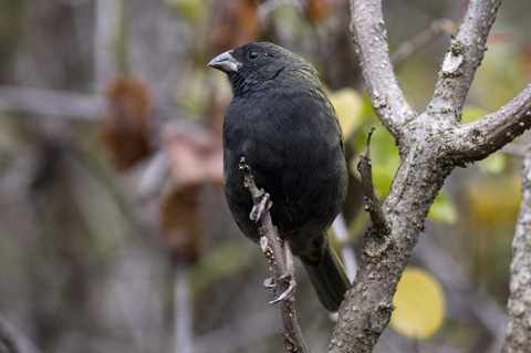 tordo comun (Tiaris bicolor), fotografiado en la ciudad de Caracas, Venezuela